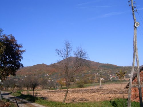 Село Остра код Чачка у Србији.